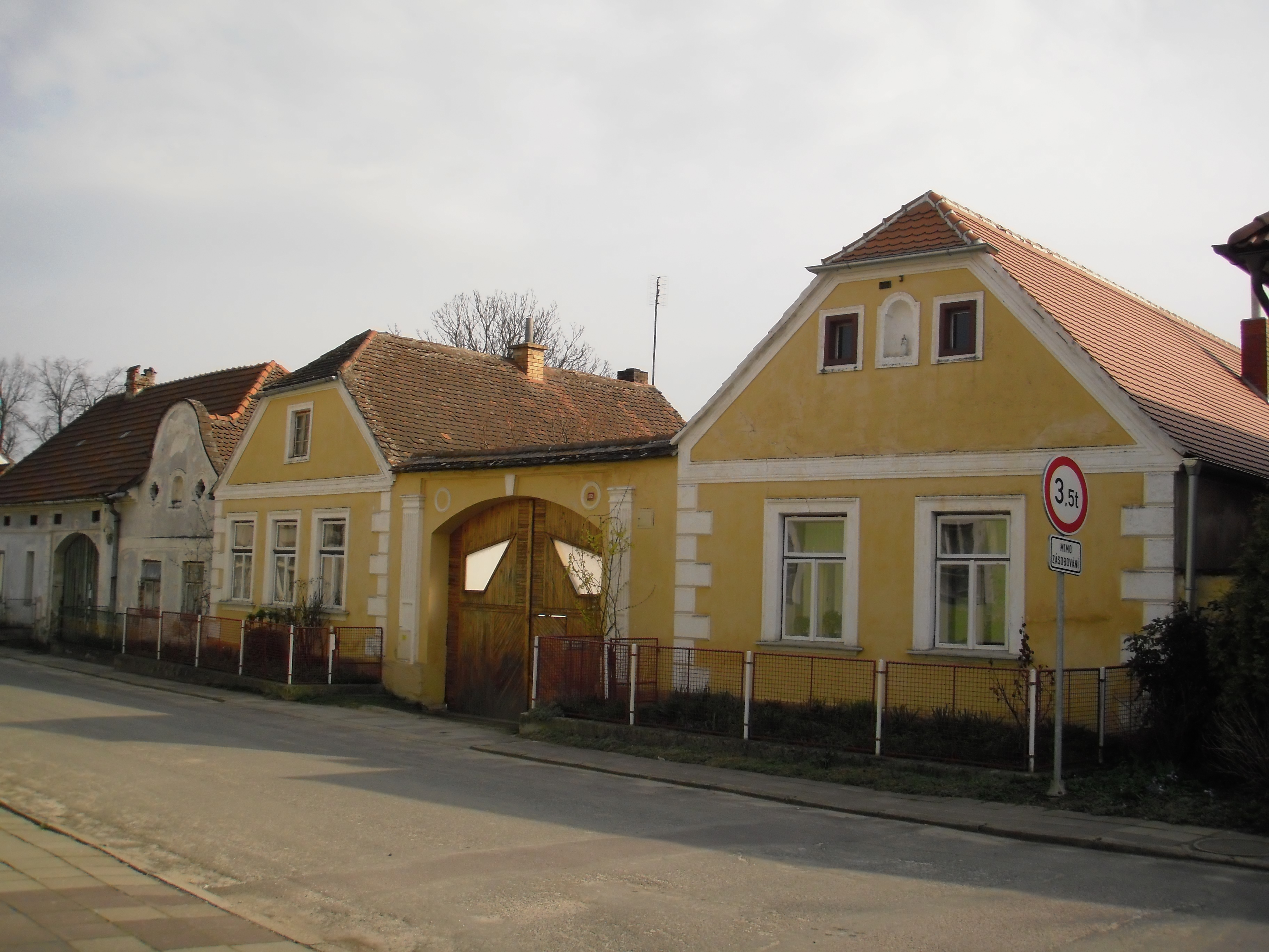 Preserved village Desov (CZ)